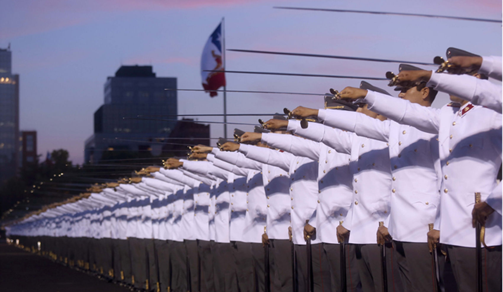 El Ministro de Defensa Nacional acompaña a la Presidenta de la República a la ceremonia de graduación de Oficiales del Ejército promoción 2012-2015.